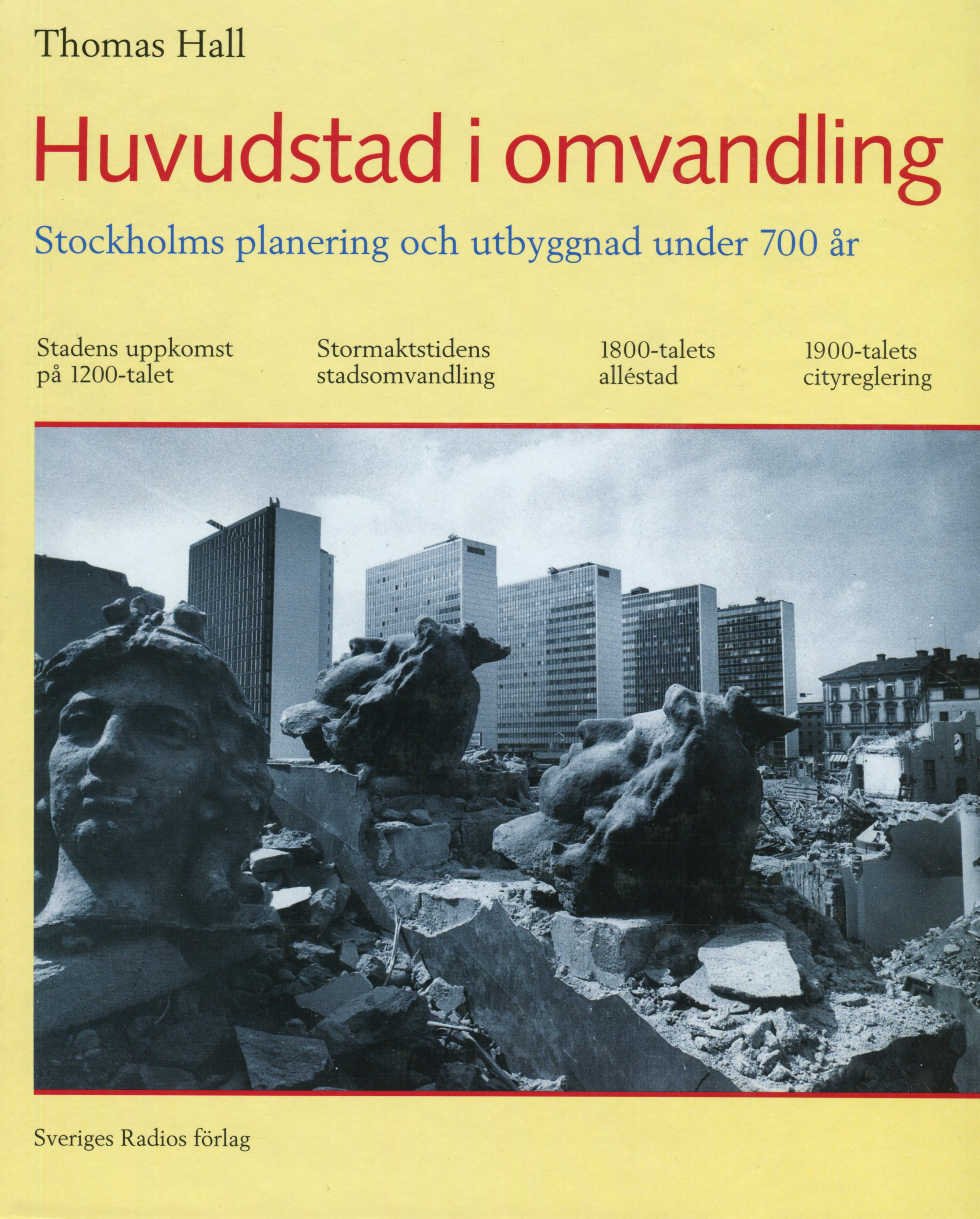 Thomas Halls publikation "Huvudstad i omvandling" från 1999. Hall var professor i konstvetenskap vid Stockholms universitet, forskare i arkitekturhistoria och författare.